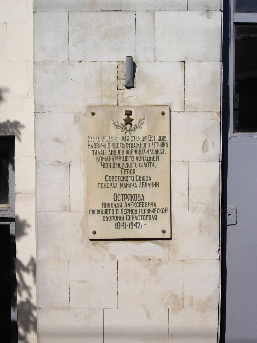 Мемориальная доска а здании станции Остряково.